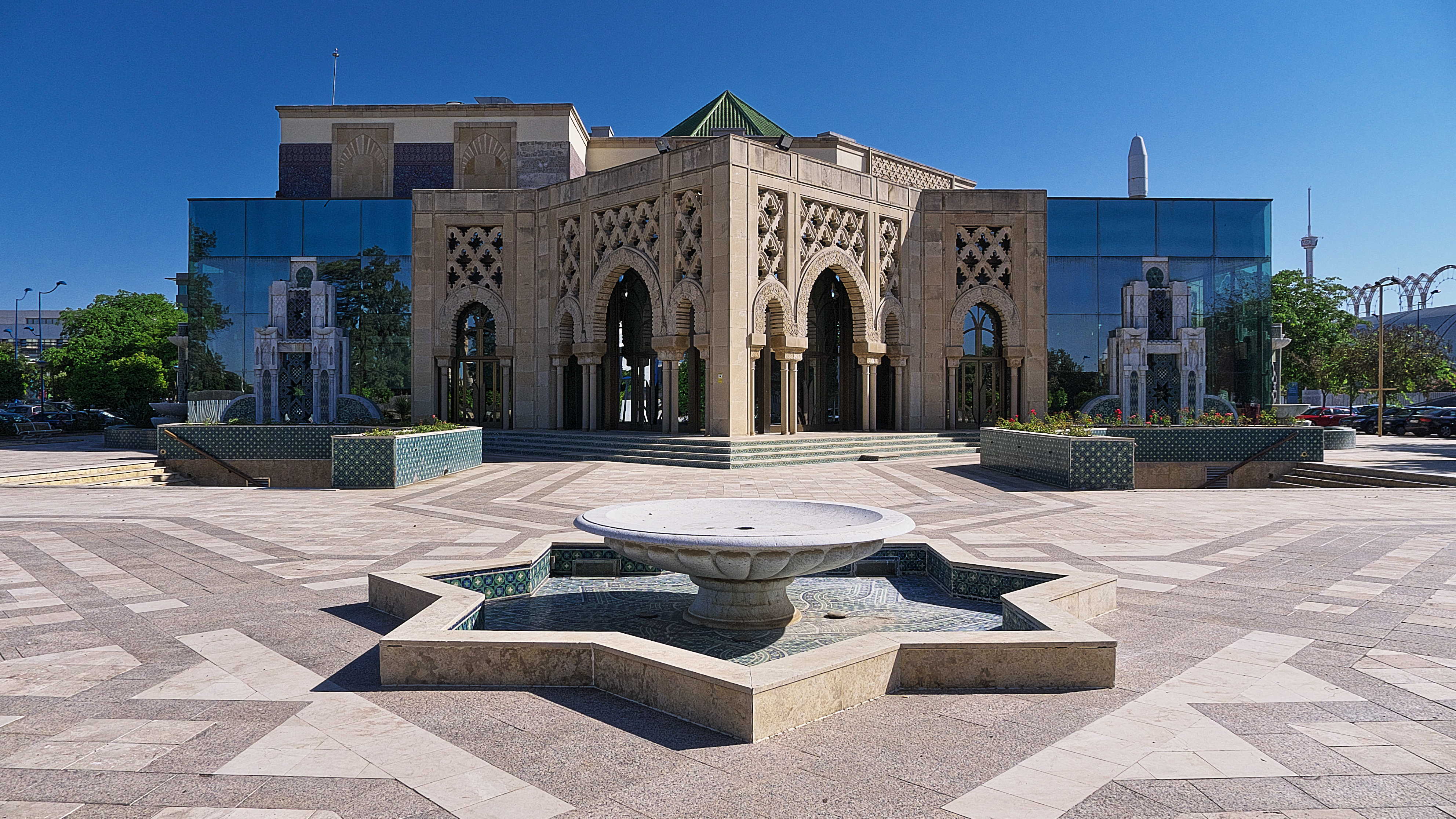 Para algunos, entre los mejores de la Exposición Universal de Sevilla 1992.